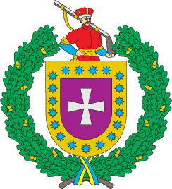 Герб Яготинського району Київської області України